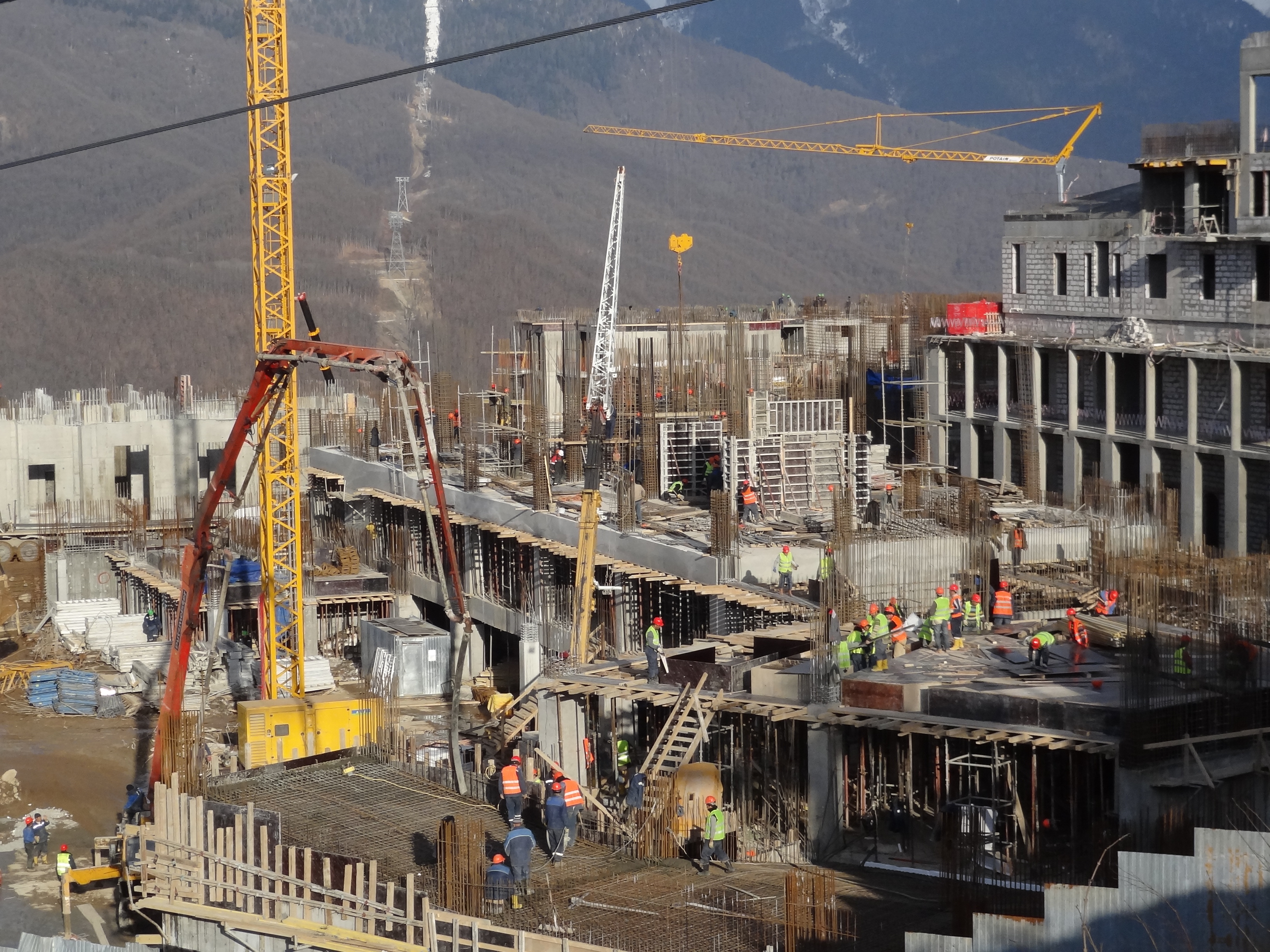 Строительство верхней части Горки город на отметке 960 м, 28 февраля 2013 года